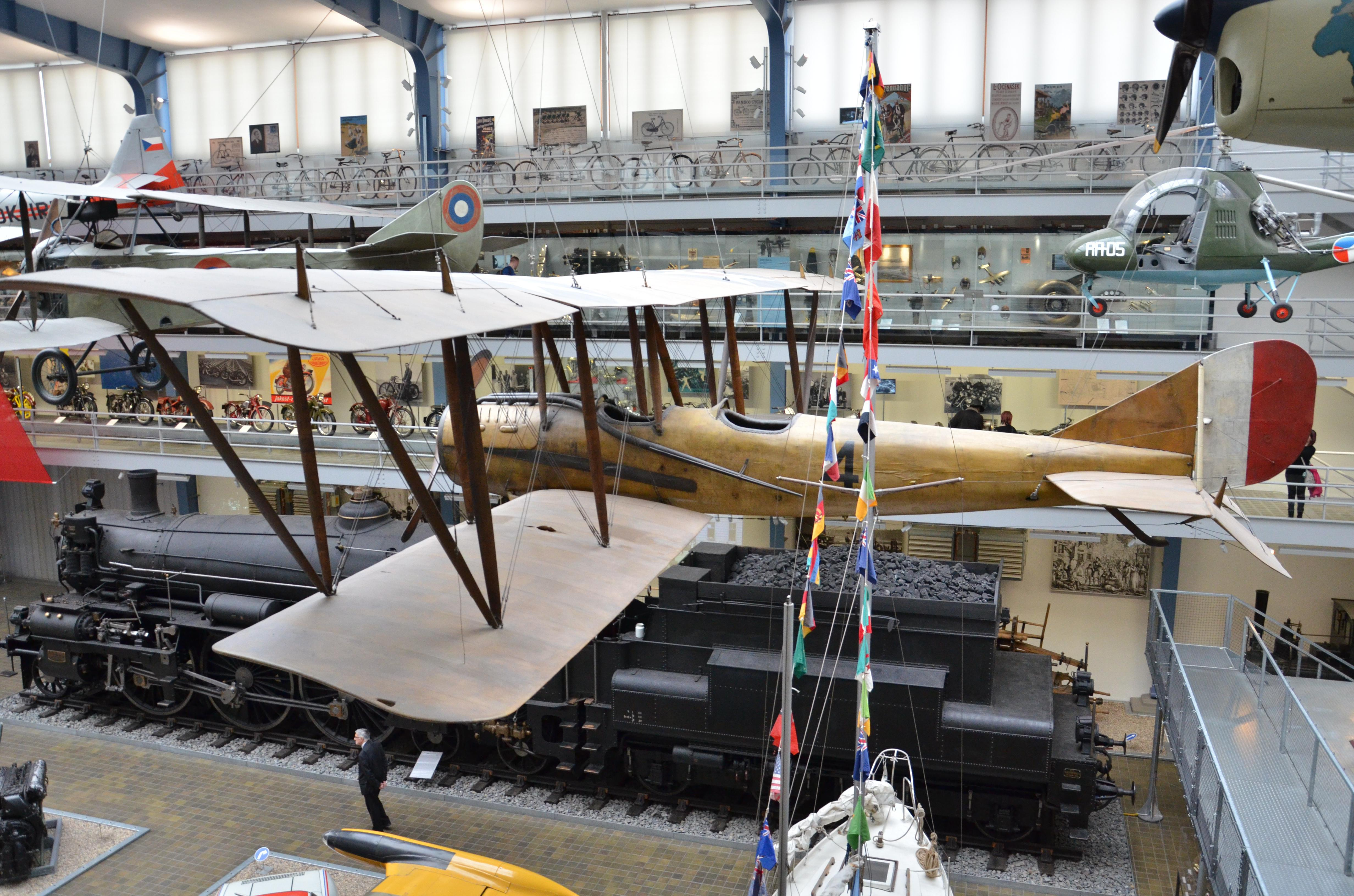 L. W. F. Model V Tractor je americký dvoumístný cvičný a pozorovací dvouplošník. Mimo jiné užíván československými legiemi v Rusku. Je vystaven v NTM v Praze.